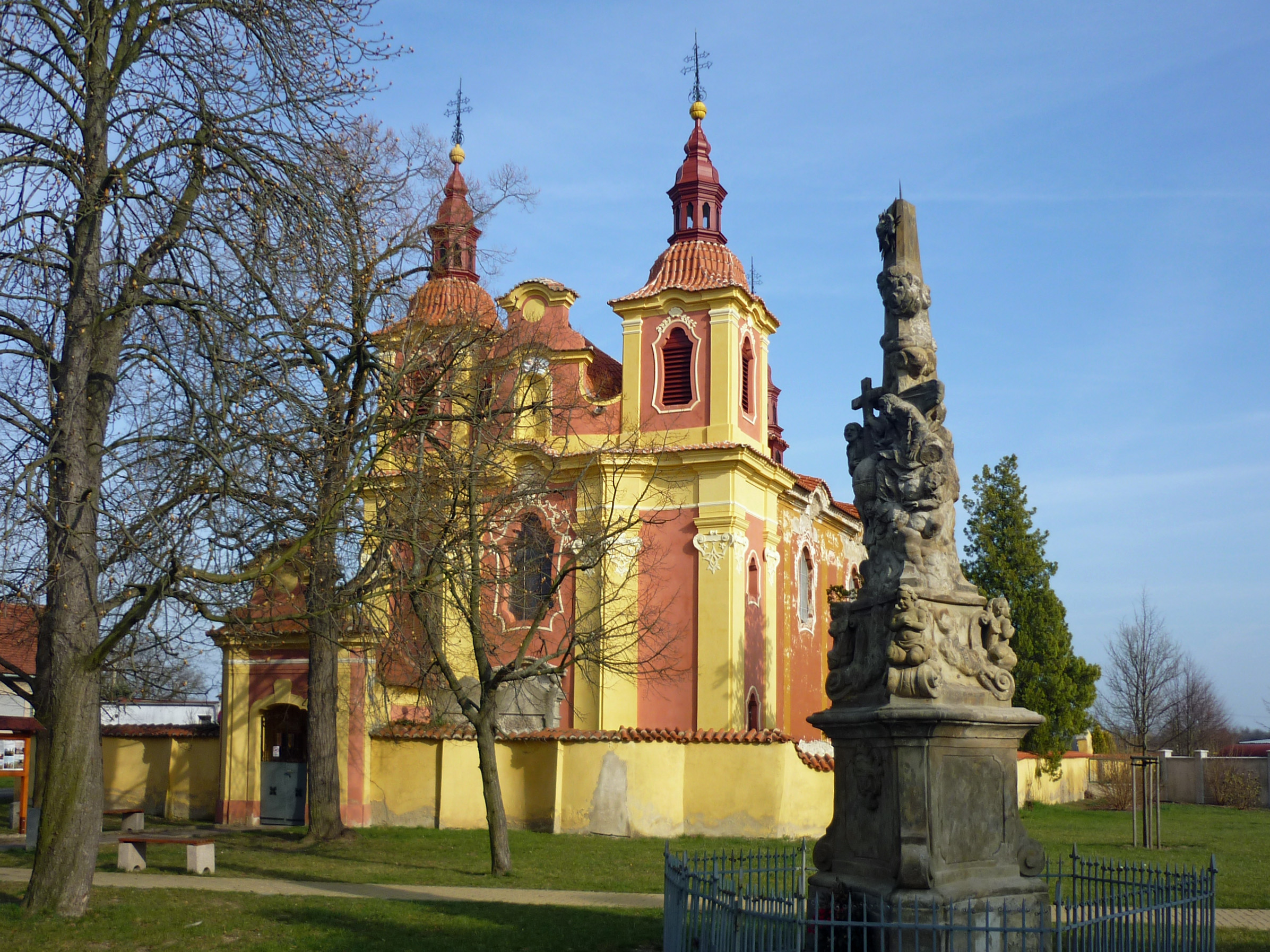 St. Wenzelskirche in Neusattel (Nové Sedlo) bei Saaz (Žatec), Ausmalung 1872 erneuert durch Josef Schirmer (1821–1900), akademischer Maler in Saaz; Dreifaltigkeitssäule von Johann Wenzel Grauer, Sandstein (um 1745)